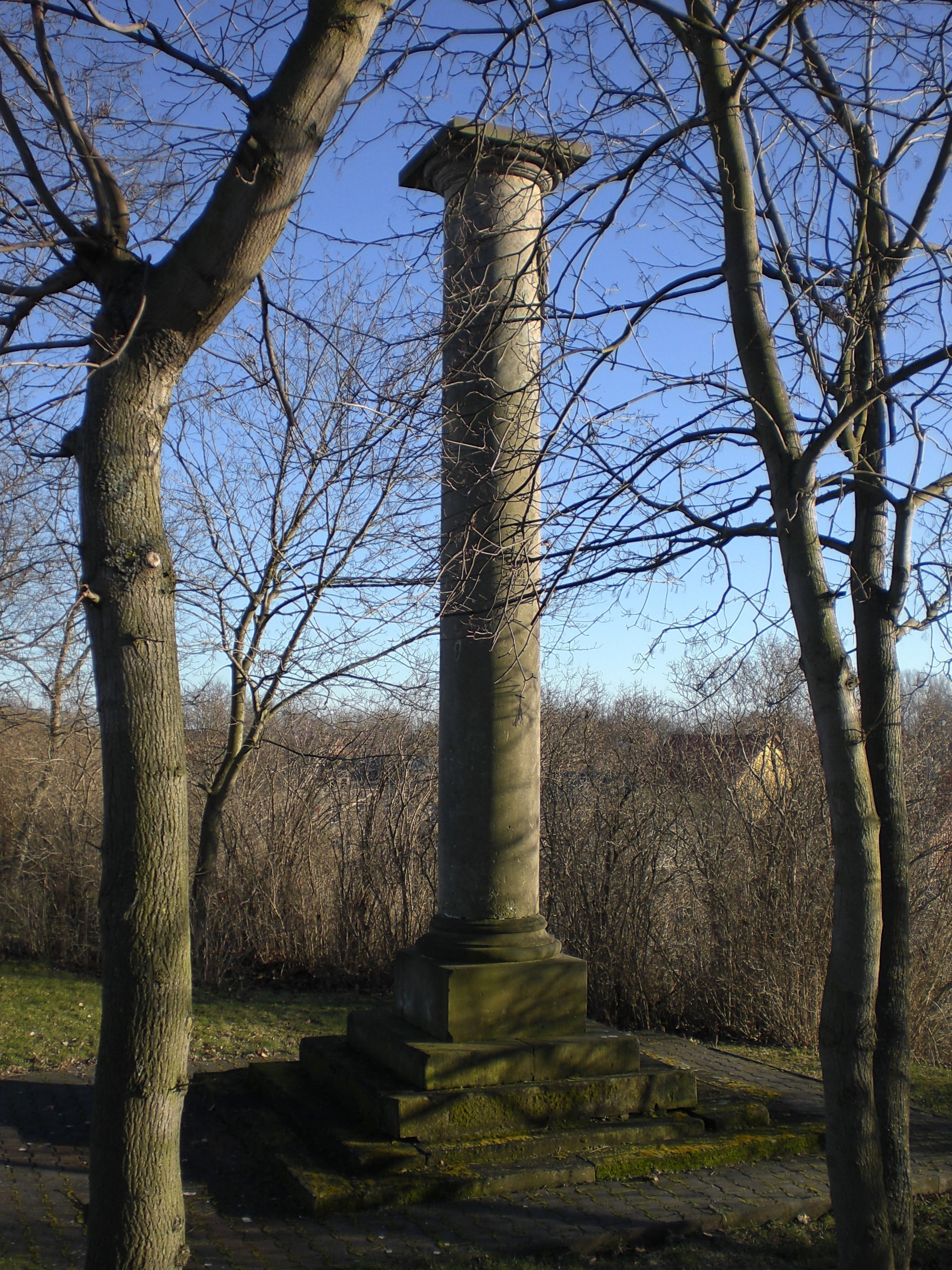 Denkmal für die Familie von Angern in Sülldorf in Sachsen-Anhalt